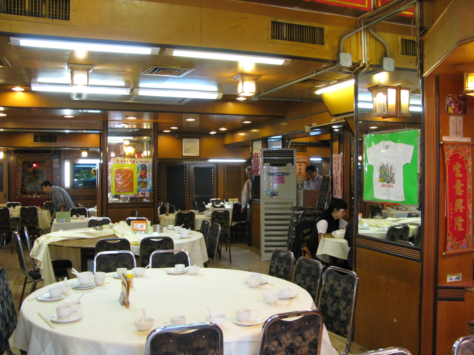 Lung Moon Restaurant 龍門大酒樓